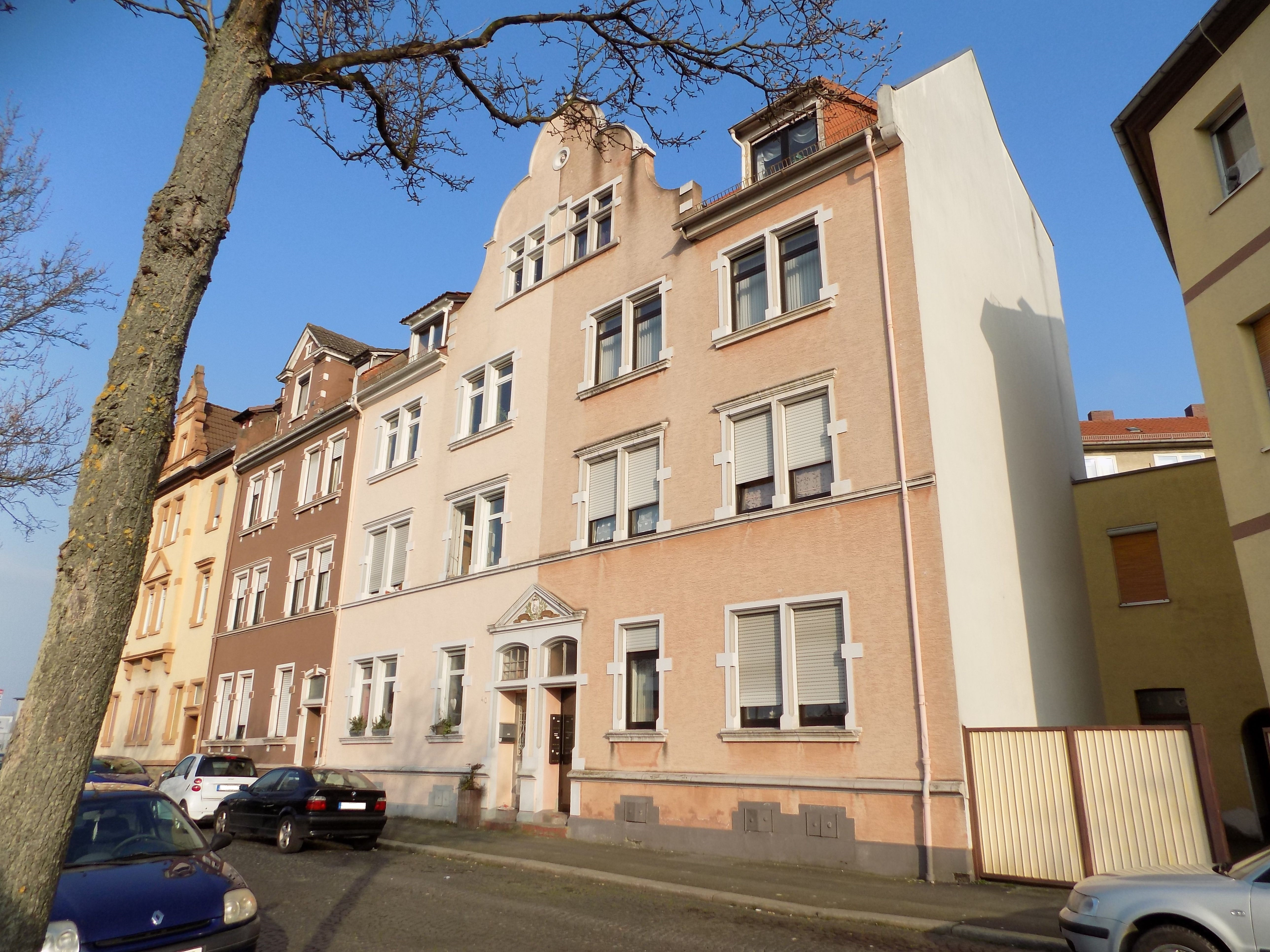 Worms Friesenstr. 38/40